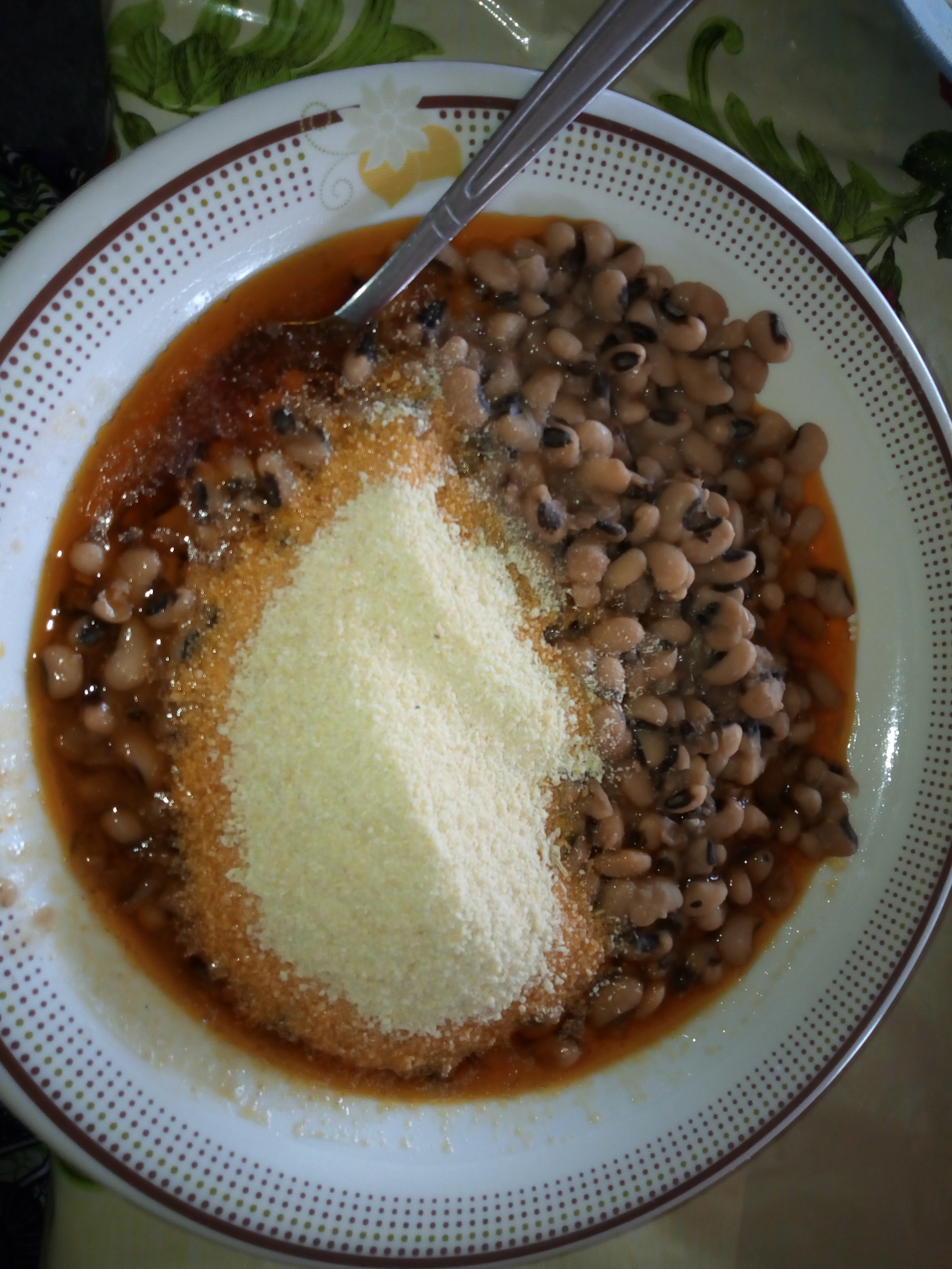 Un plat d'haricot au Bénin.ou Abobo désigne en langue locale fon, un plat de haricots bouillis et assaisonnés (ail, oignon, piment, sel, poivre). Il se mange avec du Dja, du piment, de l’huile de palme ou d’arachides, du pain, du massa ou du gari.